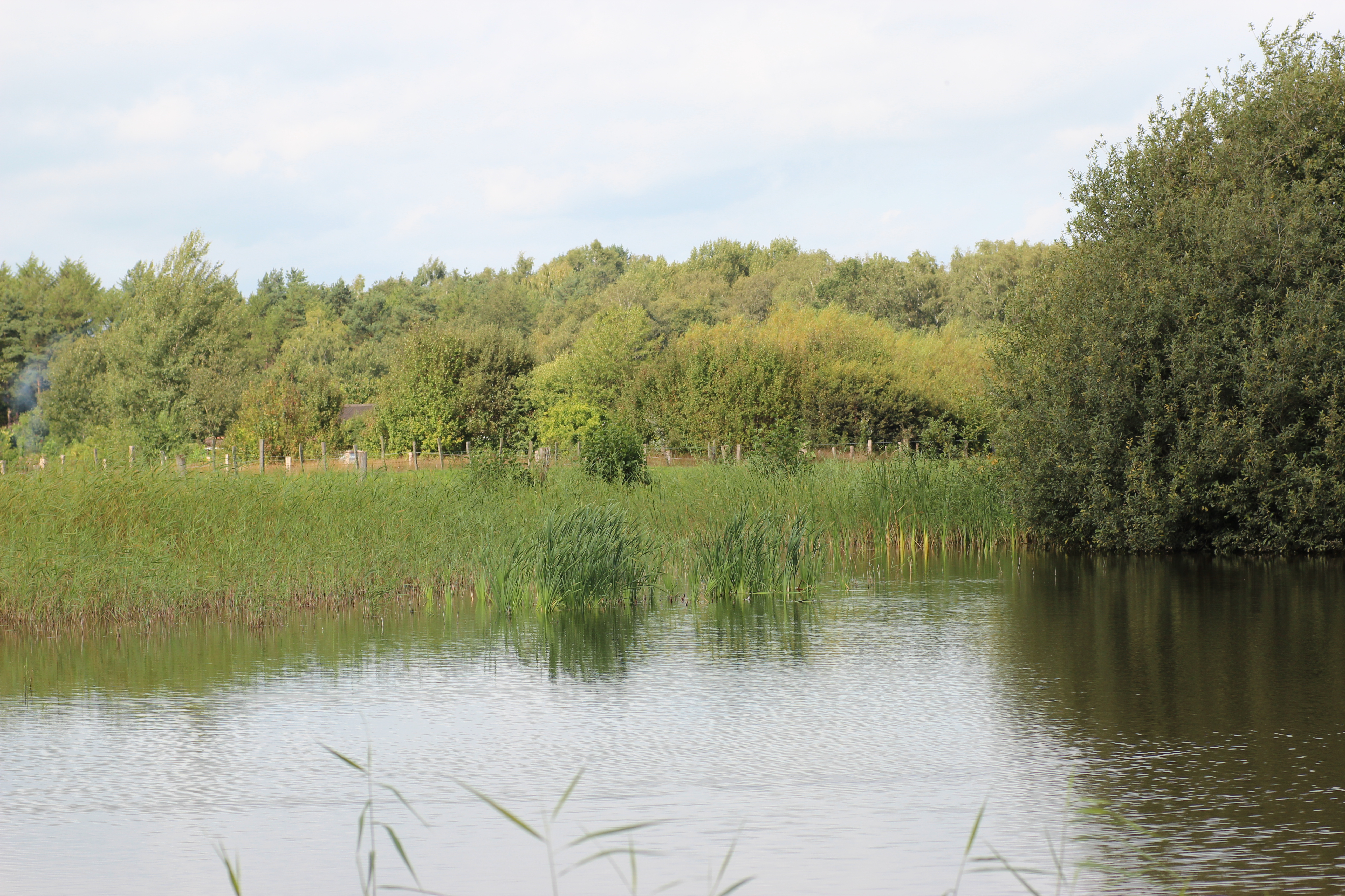 Eispohl im Naturschutzgebiet Eispohl/Sandwehen, Bremen